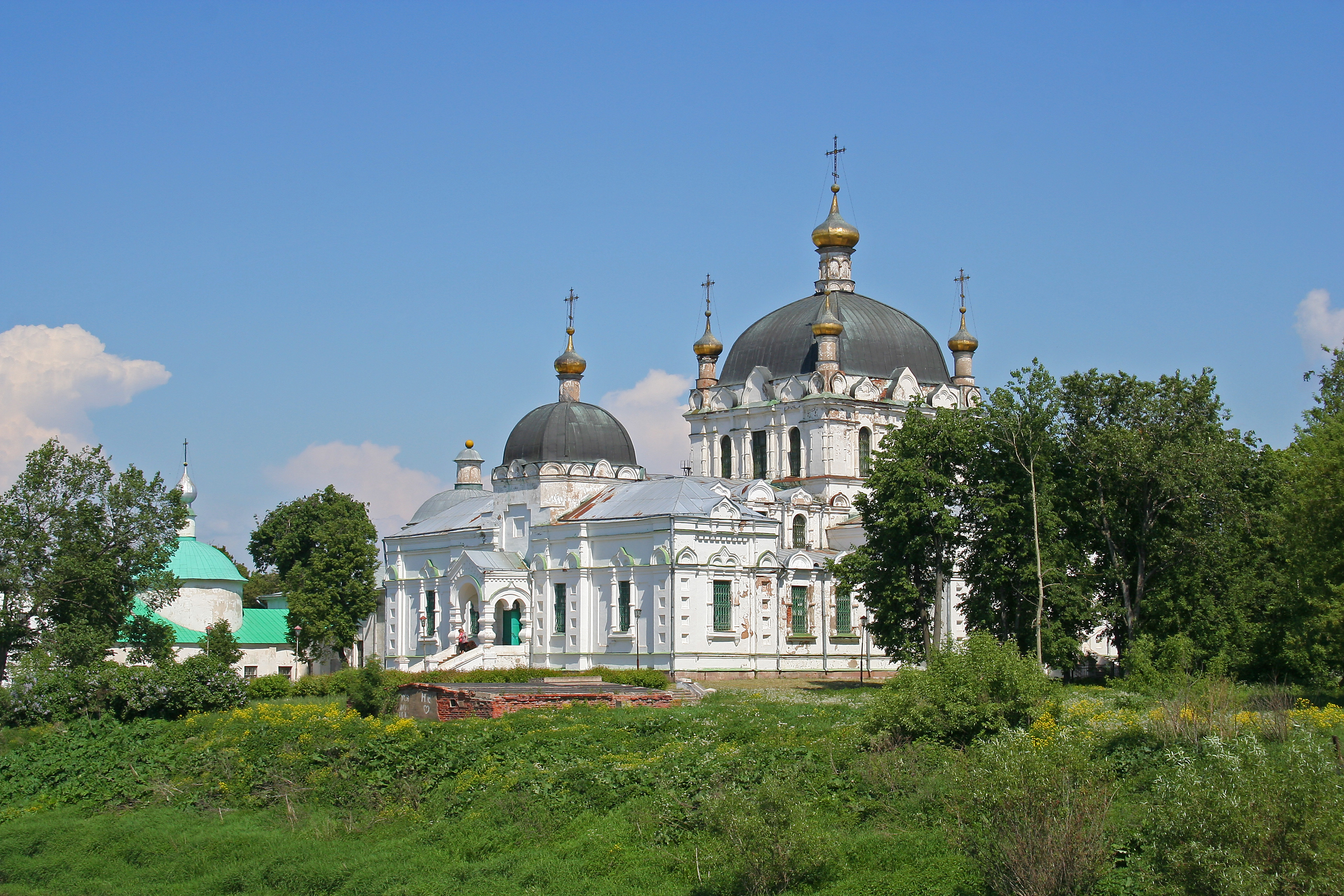 Stadt Gagarin (ehem. Gschatsk), Oblast Smolensk, Russland. Ehemalige Mariä-Verkündigungs-Kathedrale, heute Heimatmuseum.